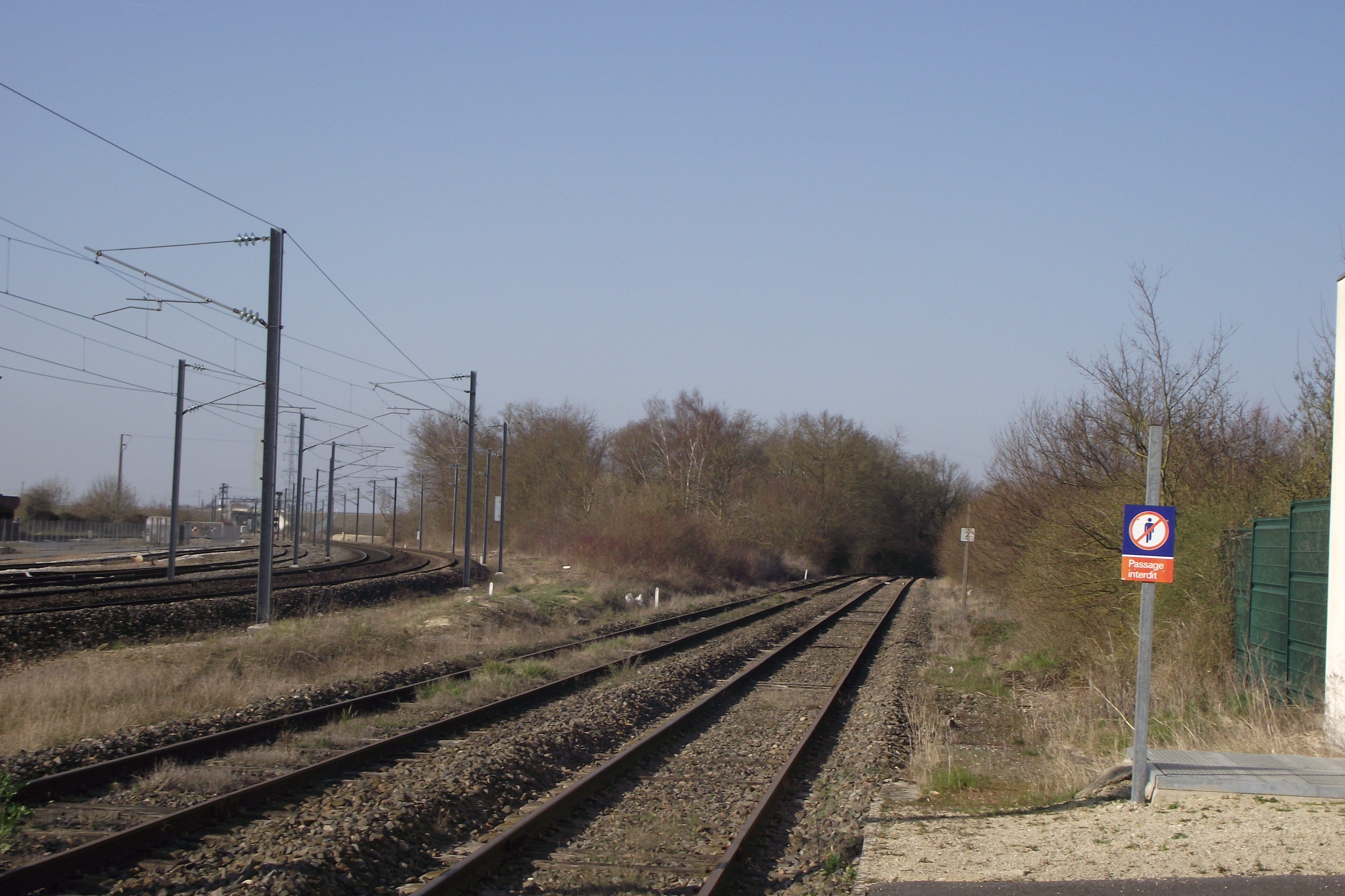 Les quais de la gare de St-Hilaire au Temple, avec la bifurcation de la ligne vers Reims (à gauche) et celle vers Verdun (à droite)